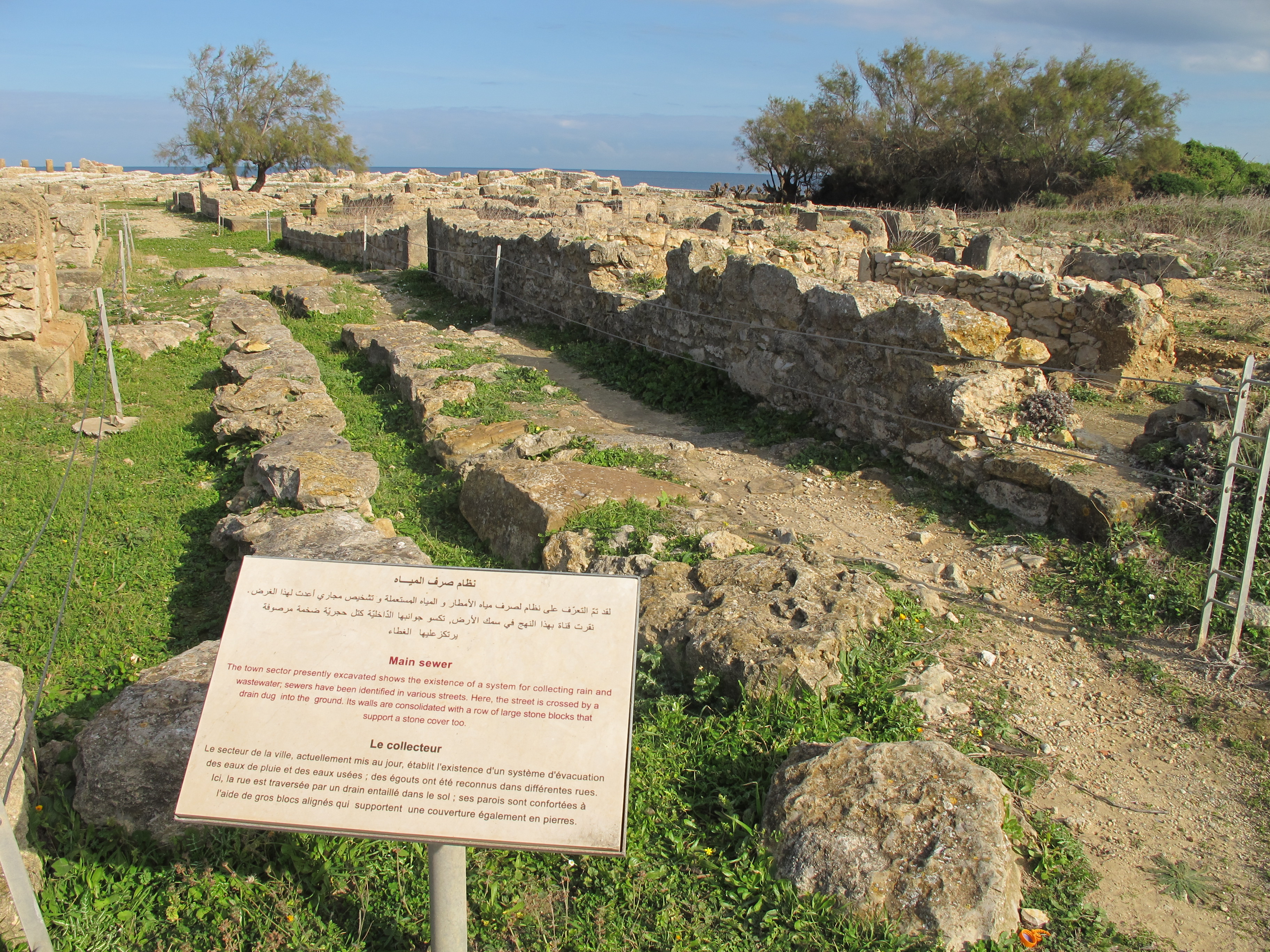 Hauptabwasserleitung in Kerkouane, Tunesien